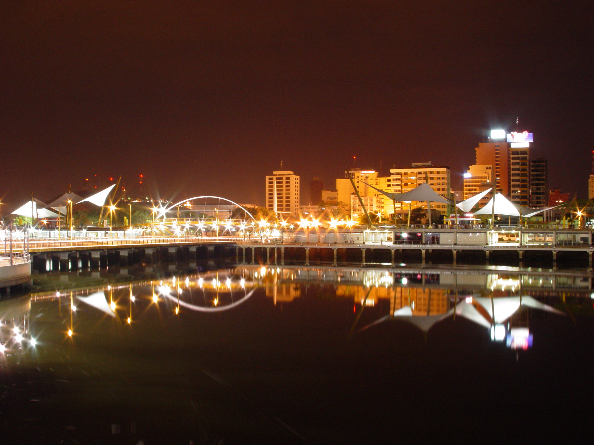 Information: Guayaquil nocturno junto al brazo de mar llamado estero salado Date: Abril 2007 Author Michel Adum III Credits : Foto Joge Gutierrez